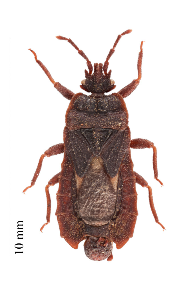 Mezira tremulae